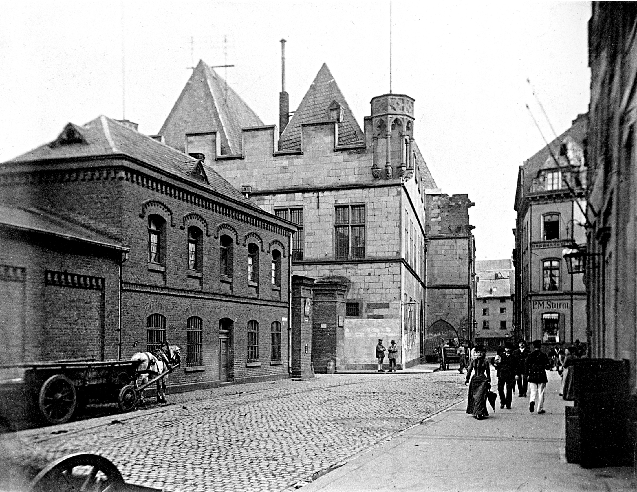 Am Bollwerk. Blick Richtung Süden, Mauthgasse.Links: Preußisches Zollhaus (Backsteingebäude)Mitte hinten: Stapelhaus, mit Zinnen und Ecktürmchen bewehrt